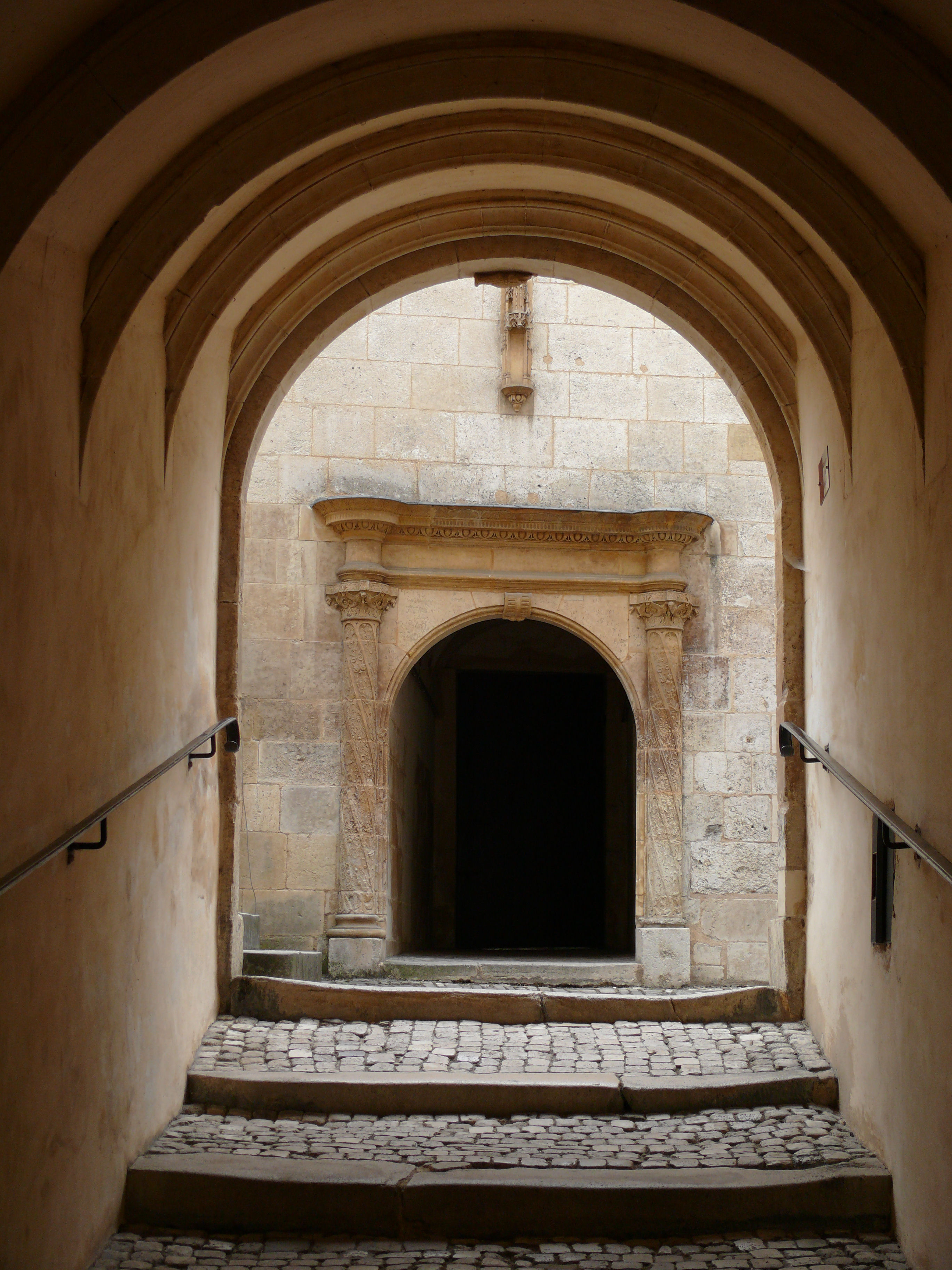 Bourges - Hôtel Lallemant - Escalier donnant accès à la cour